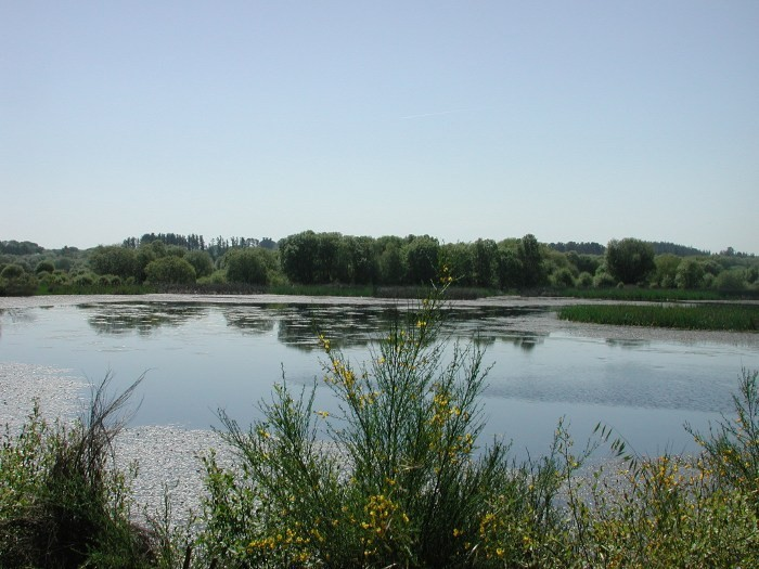 Cospeitoko lakua.